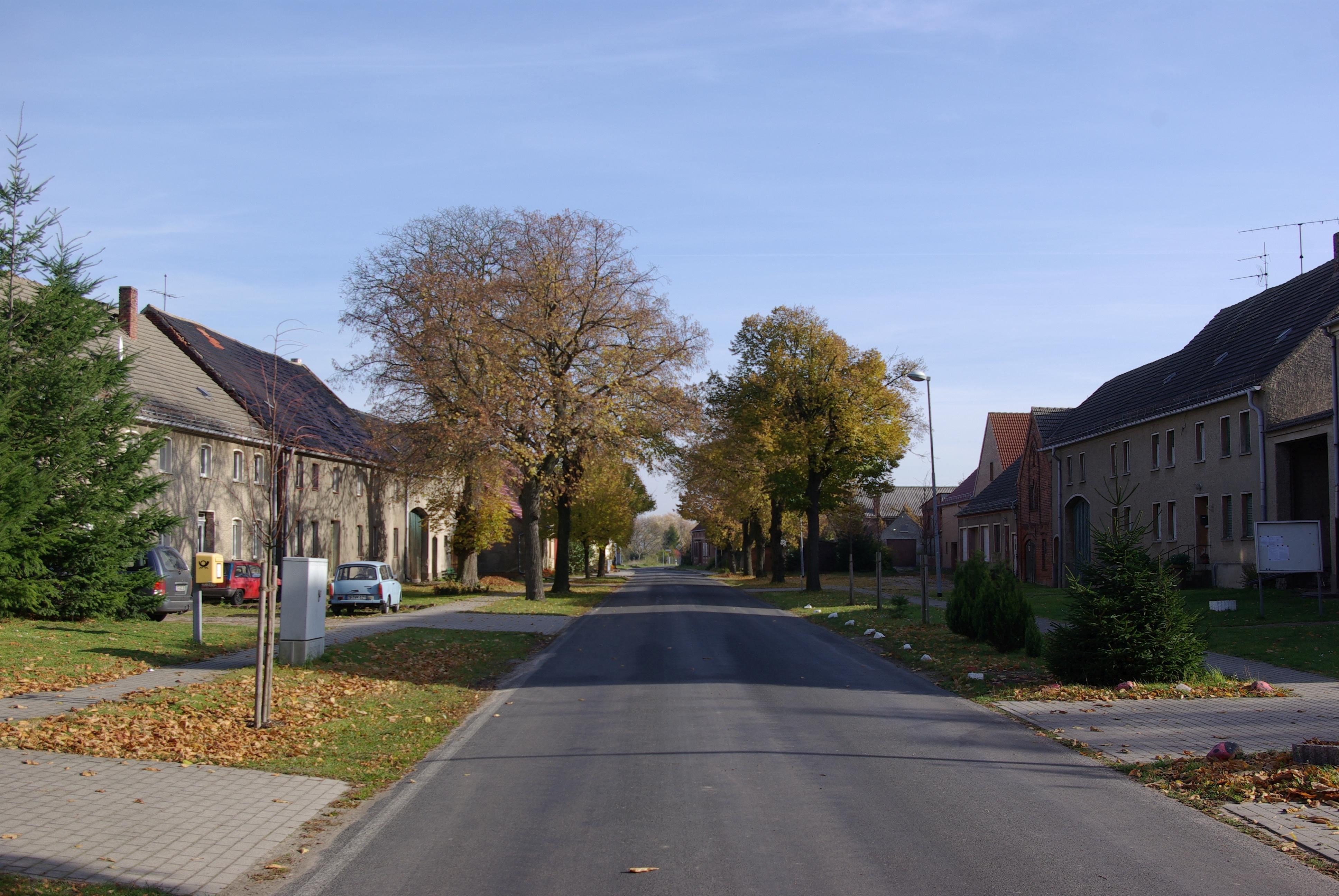 Niedergörsdorf in Brandenburg. Die Dorfstraße im Ortsteil Danna, ein Dorf mit etwa 120 Einwohner.